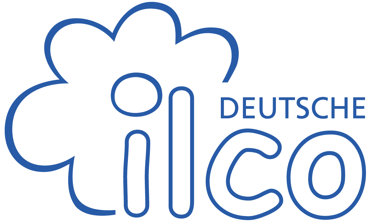 Offizielles Logo der Deutschen ILCO e.V. (Selbsthilfevereinigung für Stomaträger und Menschen mit Darmkrebs sowie deren Angehörige)